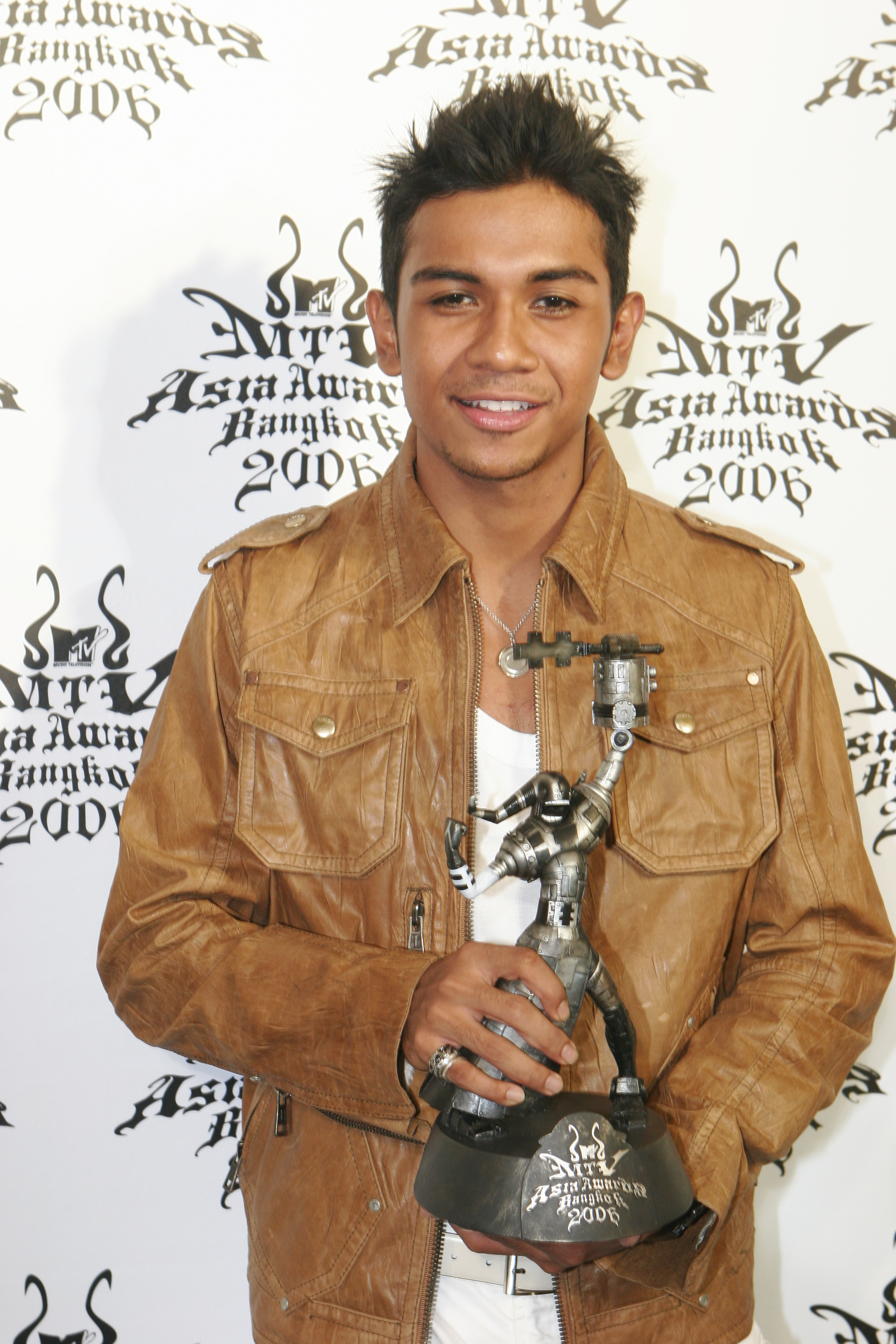 Taufik Batisah at MTV Asia Awards 2006,Thailand